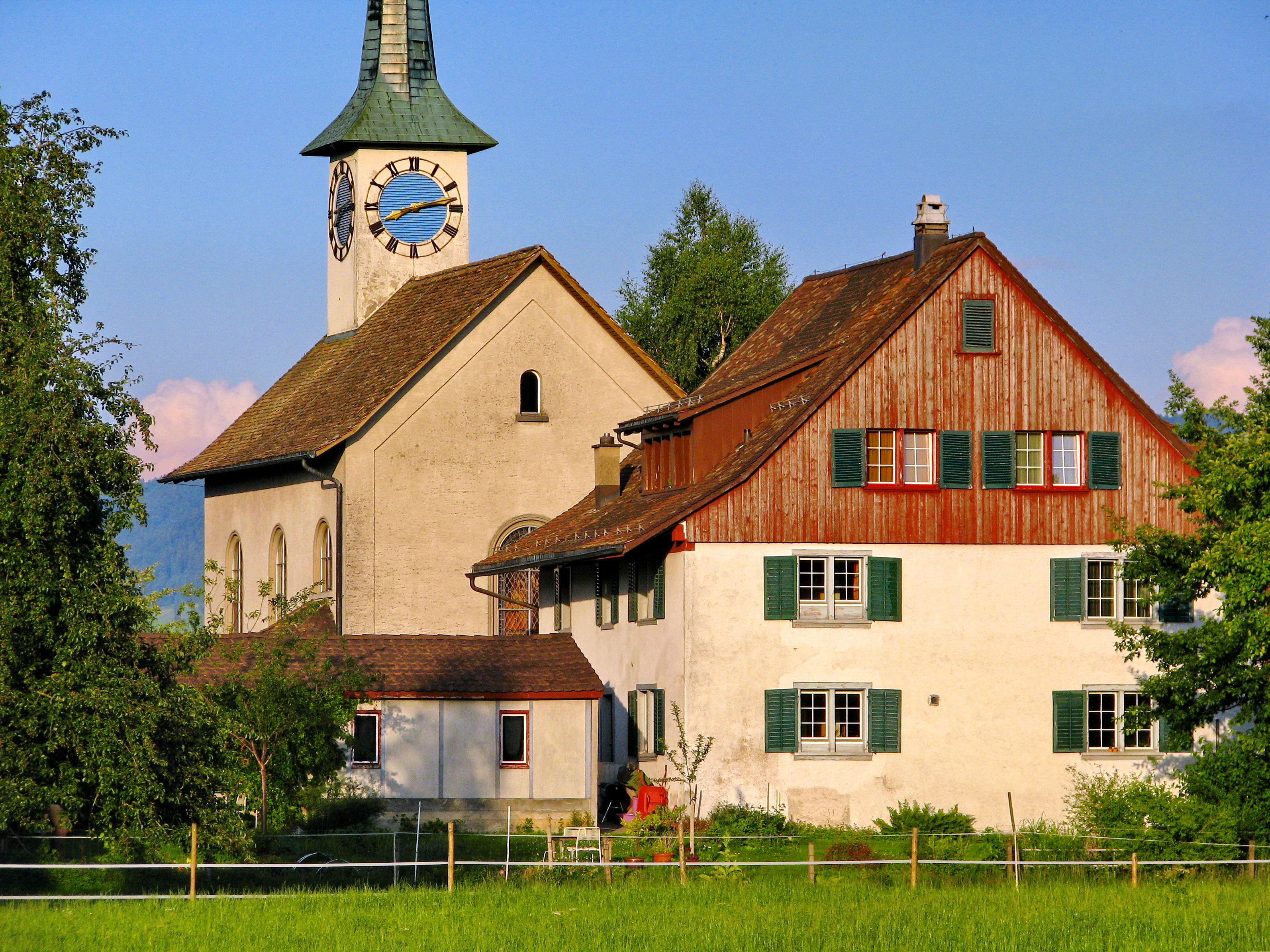 Reformed church in Seegräben (Switzerland)